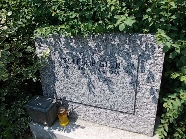 Rolf R. Bigler, Grinzinger Friedhof (38-5-14)